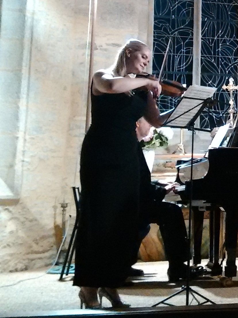 Concert du cycle musical de la chapelle de Kersaint en Landunvez - Solenne Païdassi